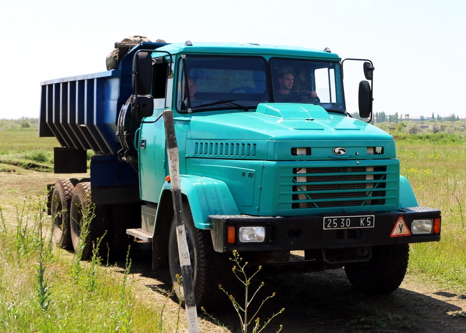 Самосвал КрАЗ-6510 Вооруженных сил Украины. Одесская военная академия, май 2017 г. Занятия по вождению.